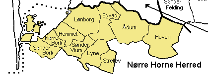 Nørre Horne Herred, Ringkøbing Amt, Denmark Map by Svend-Erik Christiansen , edited by Nico-dk.